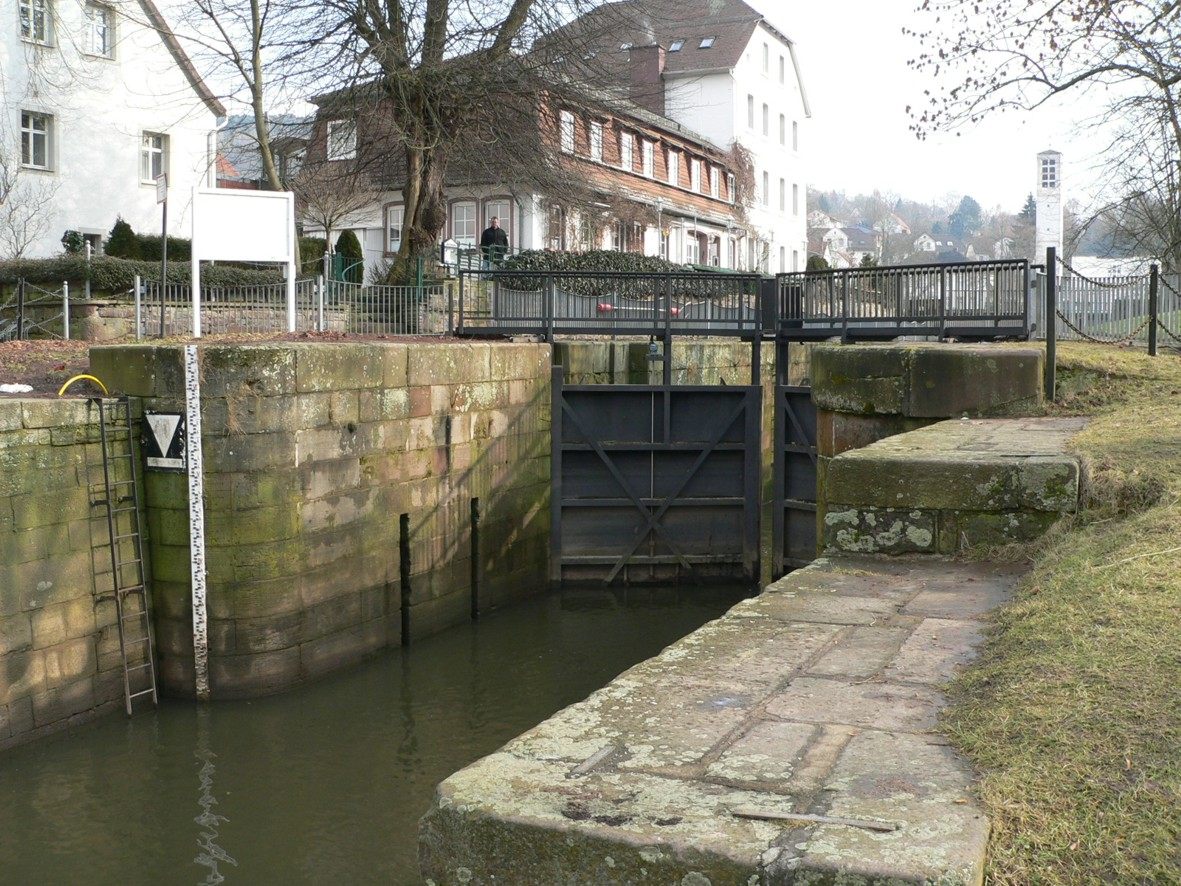 Verbindungsschleuse zwischen Weser und Hafenbecken in Bad Karlshafen. Teil des Landgraf-Carl-Kanals von 1700 Quelle: selbst fotografiert Fotograf/Zeichner: presse03 Datum: Feb. 2006